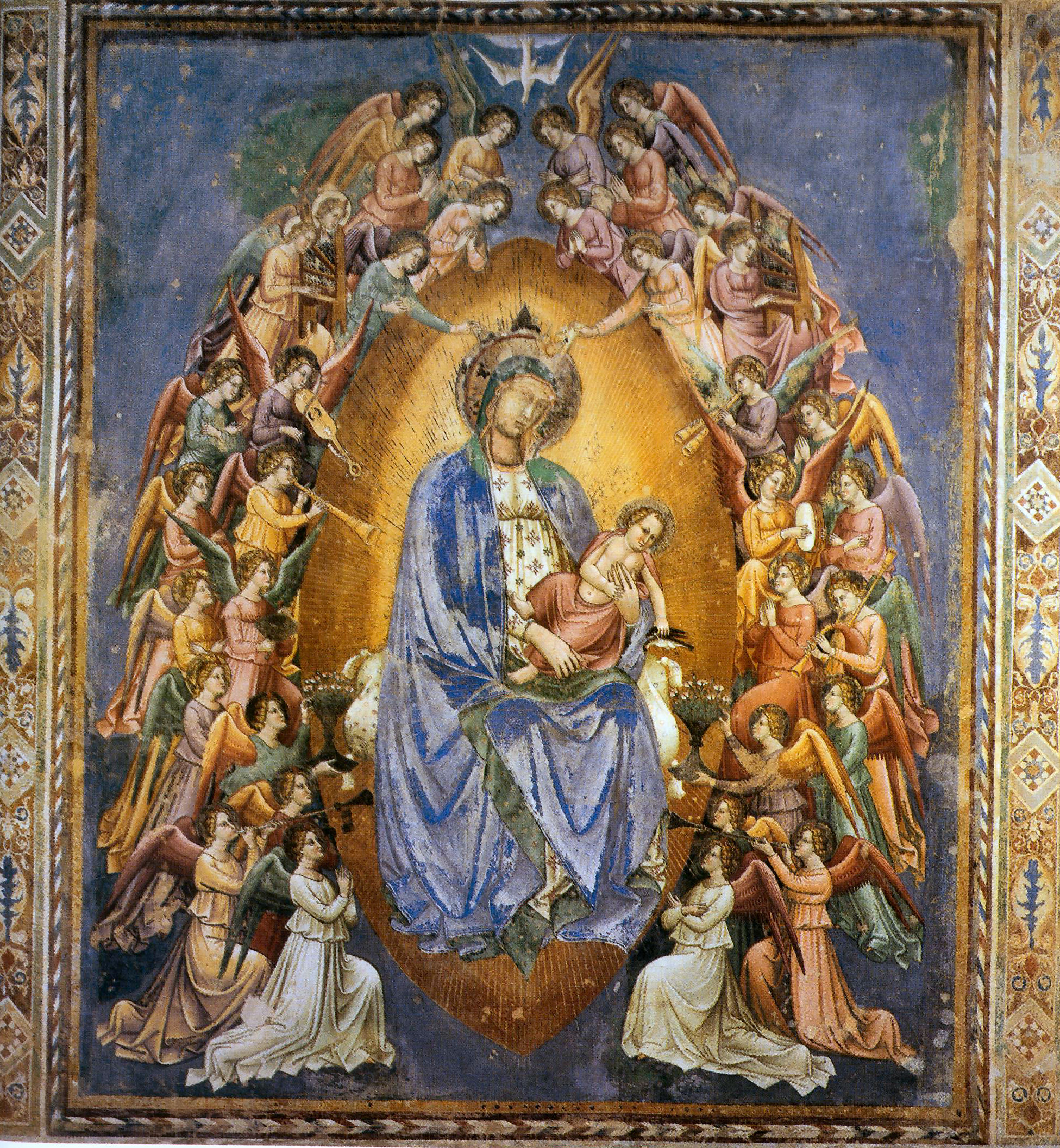 opera di Simone Martini (1310) e il resto di mano di Cenni di Francesco (1413)